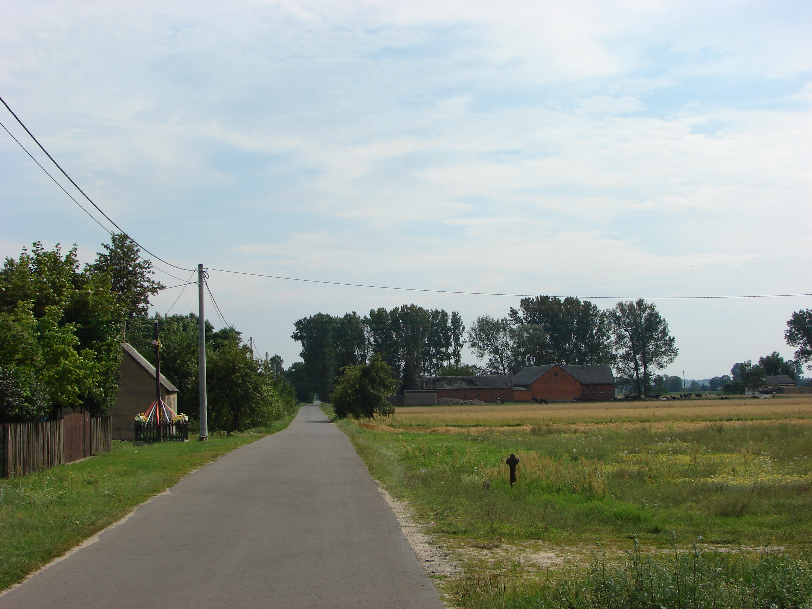 Goszczędza, Gmina Grabów.